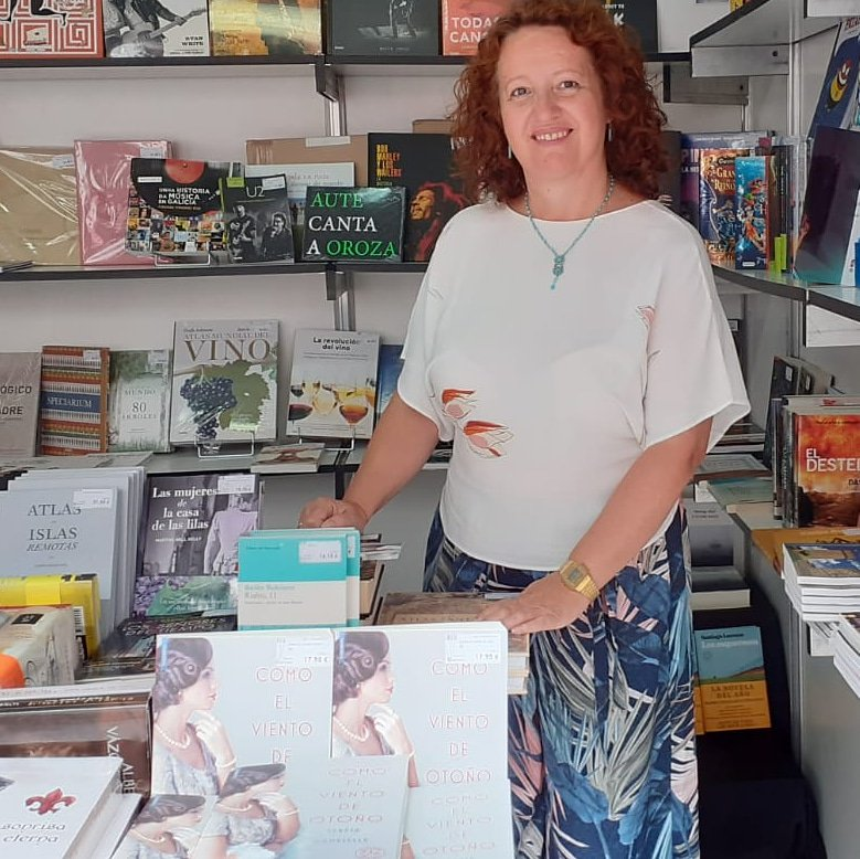 Teresa Cameselle en la Feria del Libro